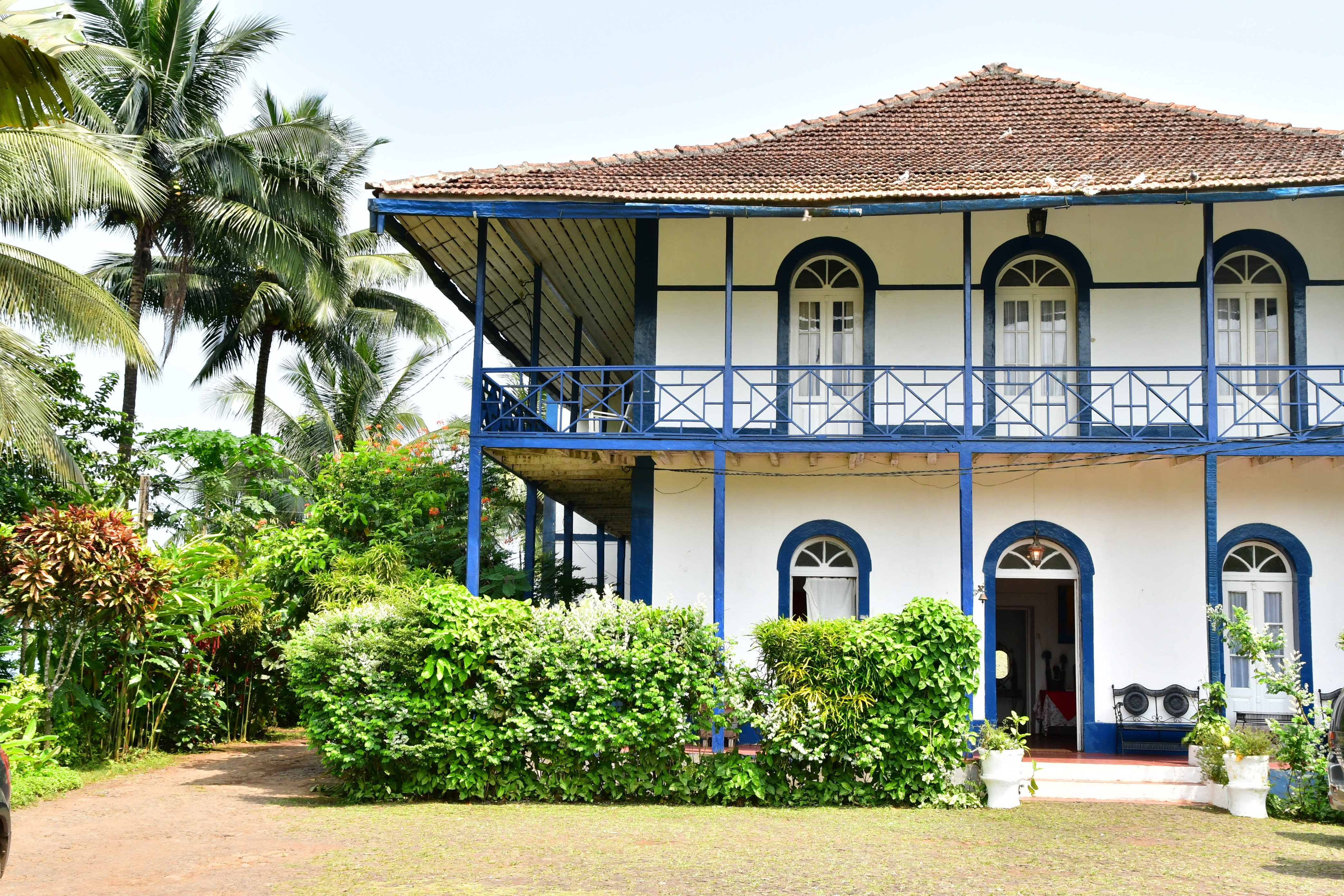 (Casa Grande)